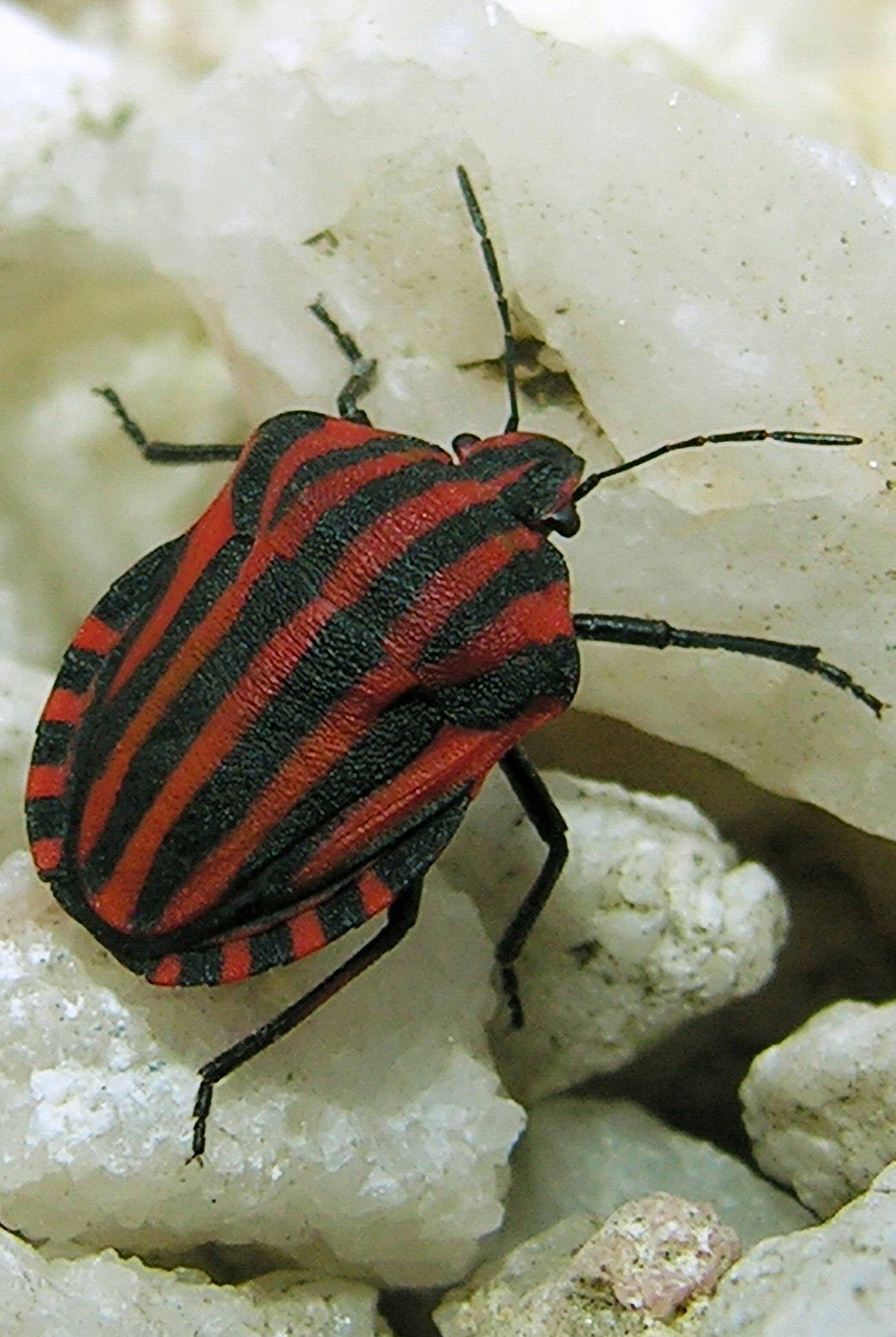 Insecto descoñecido (Graphosoma italicum). Bastavales, Brión, Galiza Publish by= Luis Miguel Bugallo Sánchez.